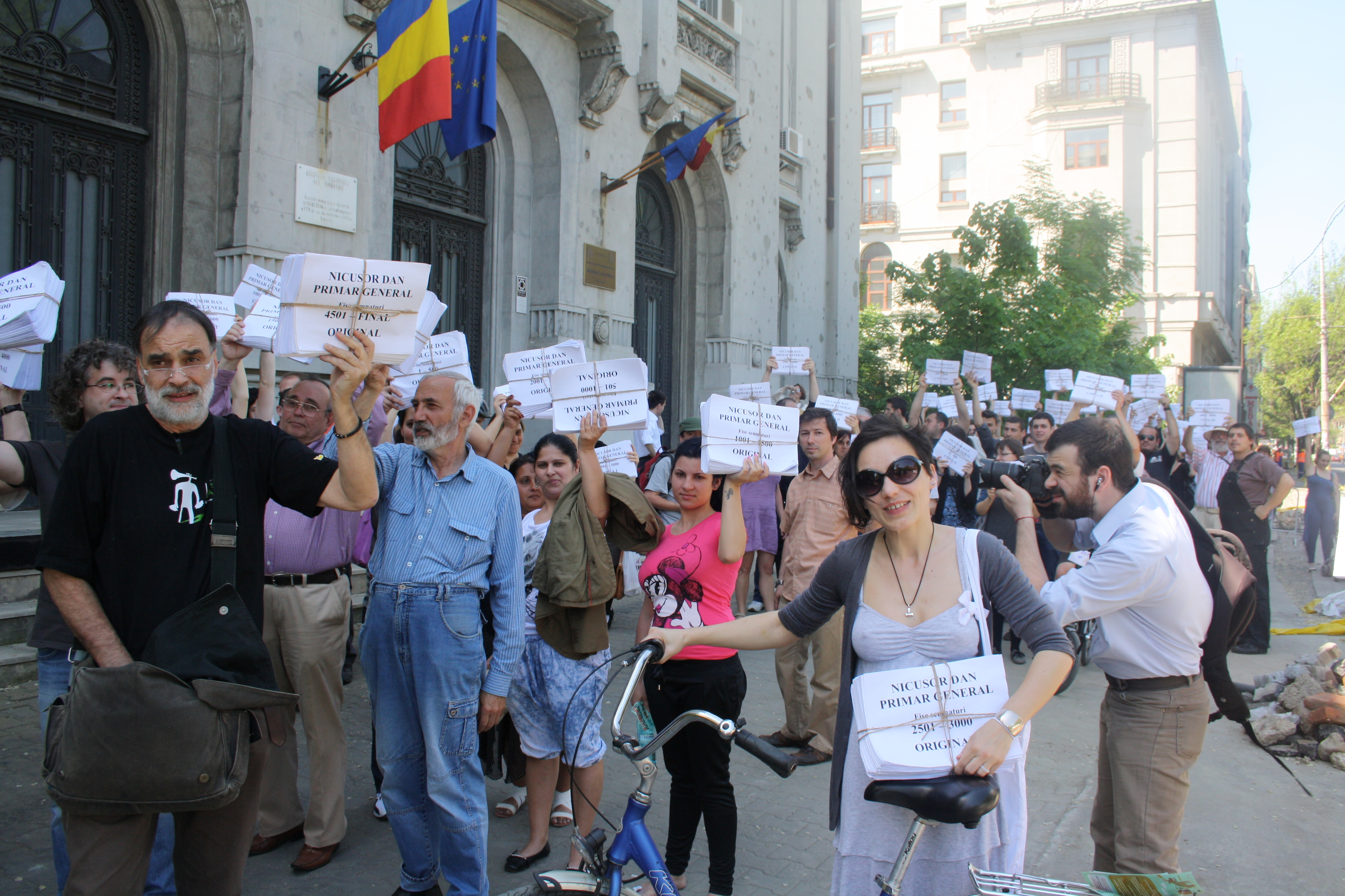 Nicușor Dan